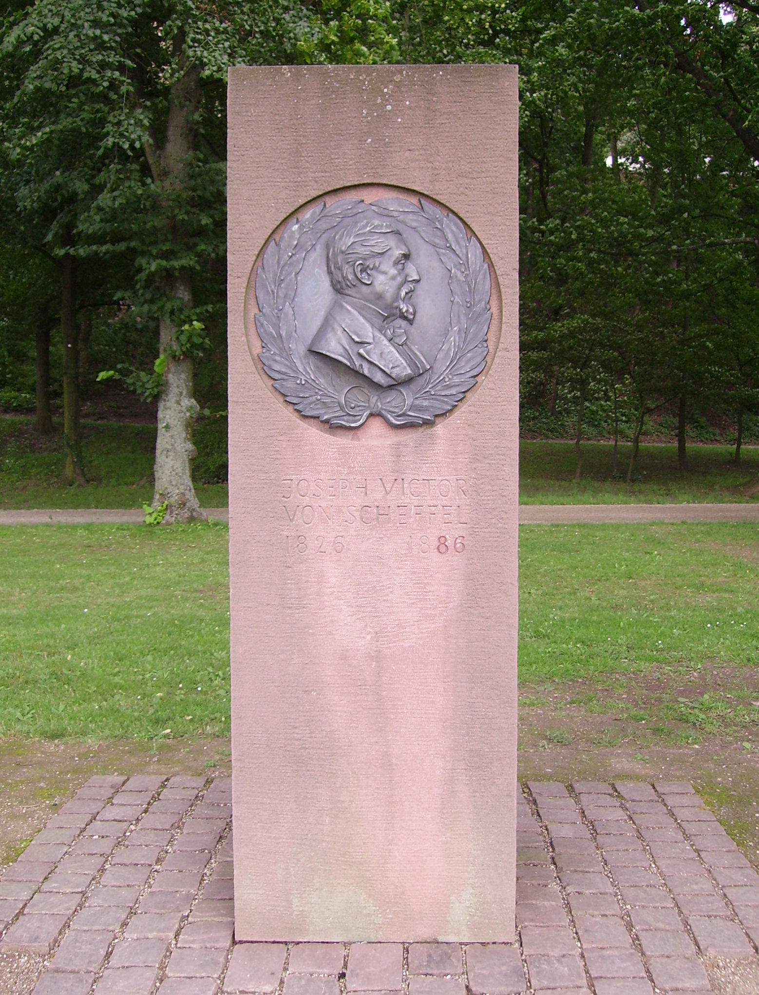 view of Heidelberg Castle